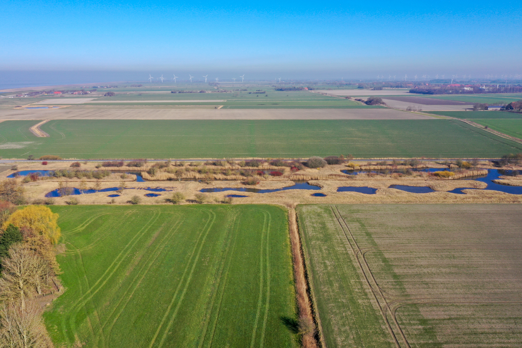 Im Vogelschutzgebite Krummhörn